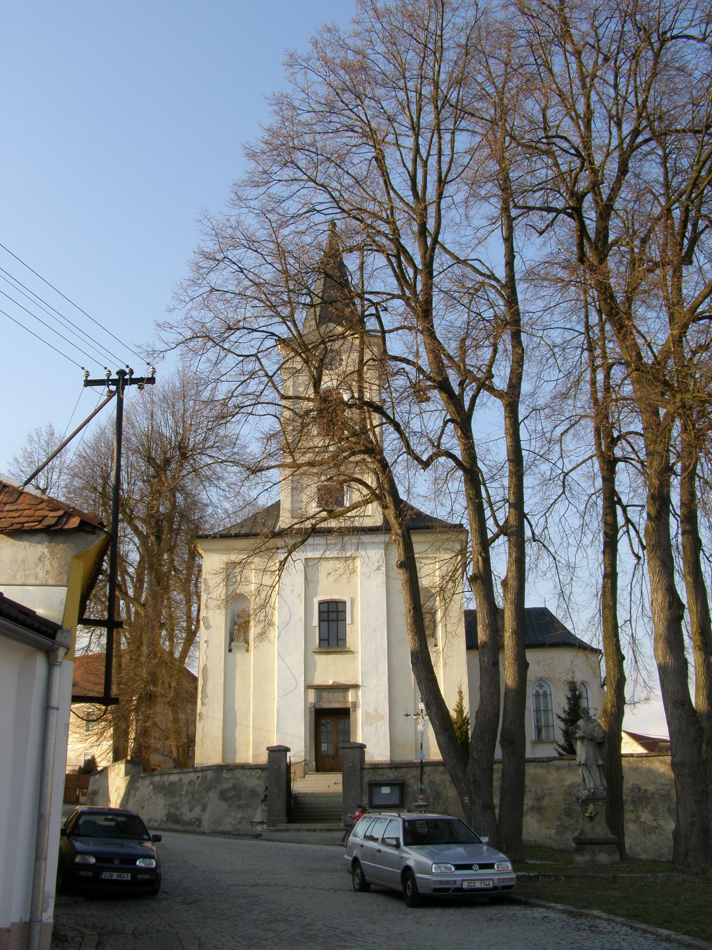 Mrákotín, Kostel svatého Jiljí